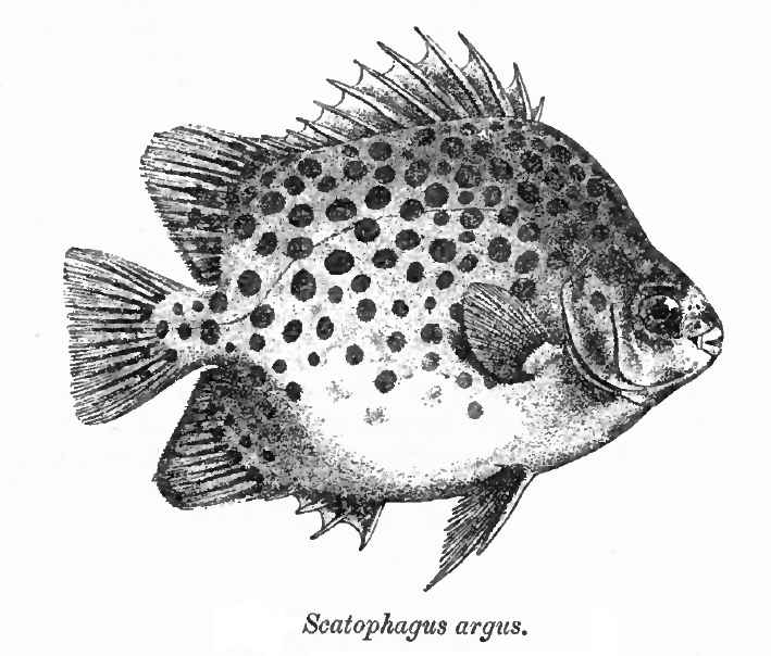 Scatophagus argus (Linnaeus, 1766)